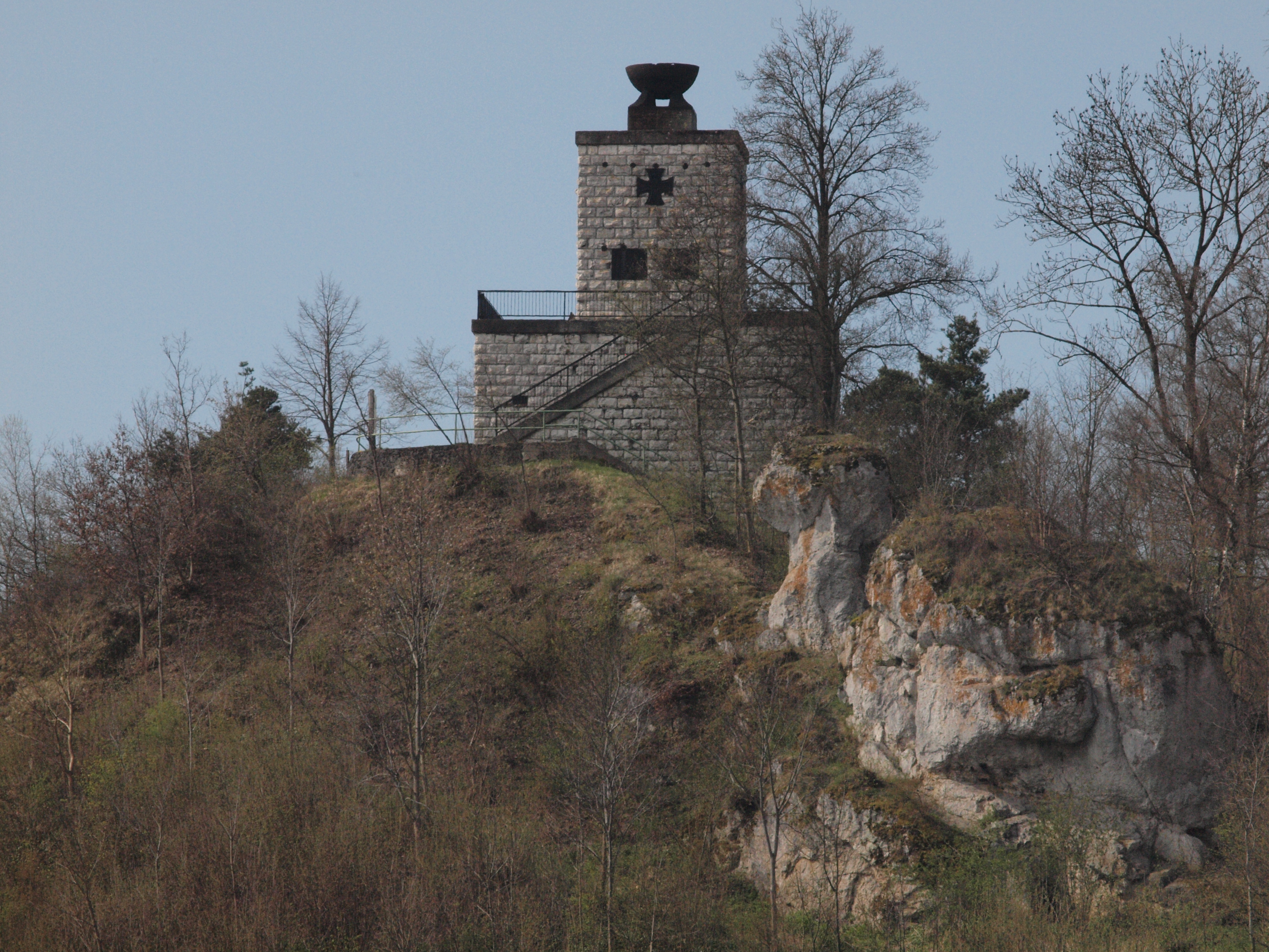 Rosenberg, Schloßberg: Kriegerdenkmal für die Gefallenen des Ersten Weltkriegs auf Burgstall Rosenberg platziert.